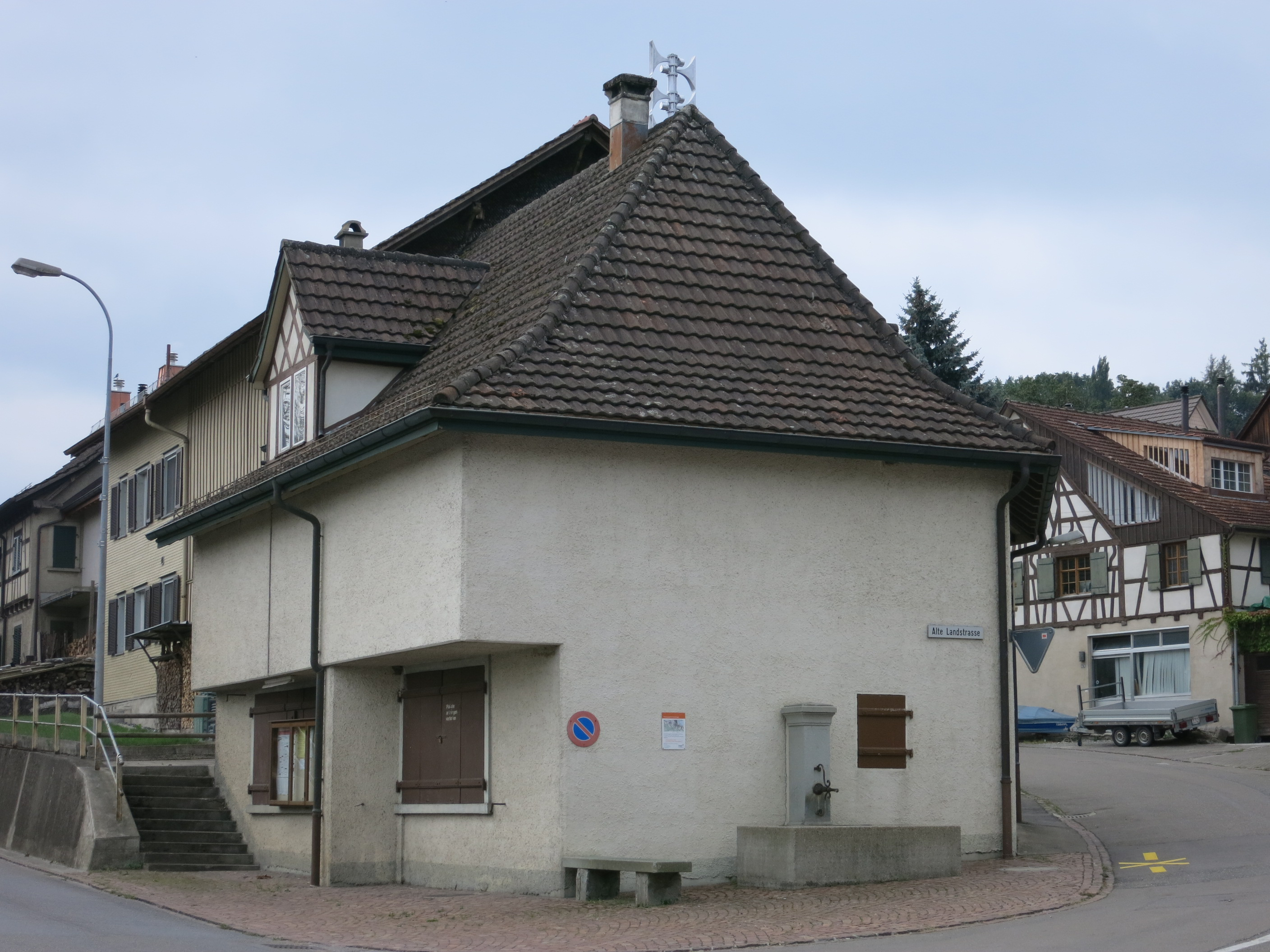 Festungsgürtel Kreuzlingen TG, Schweiz